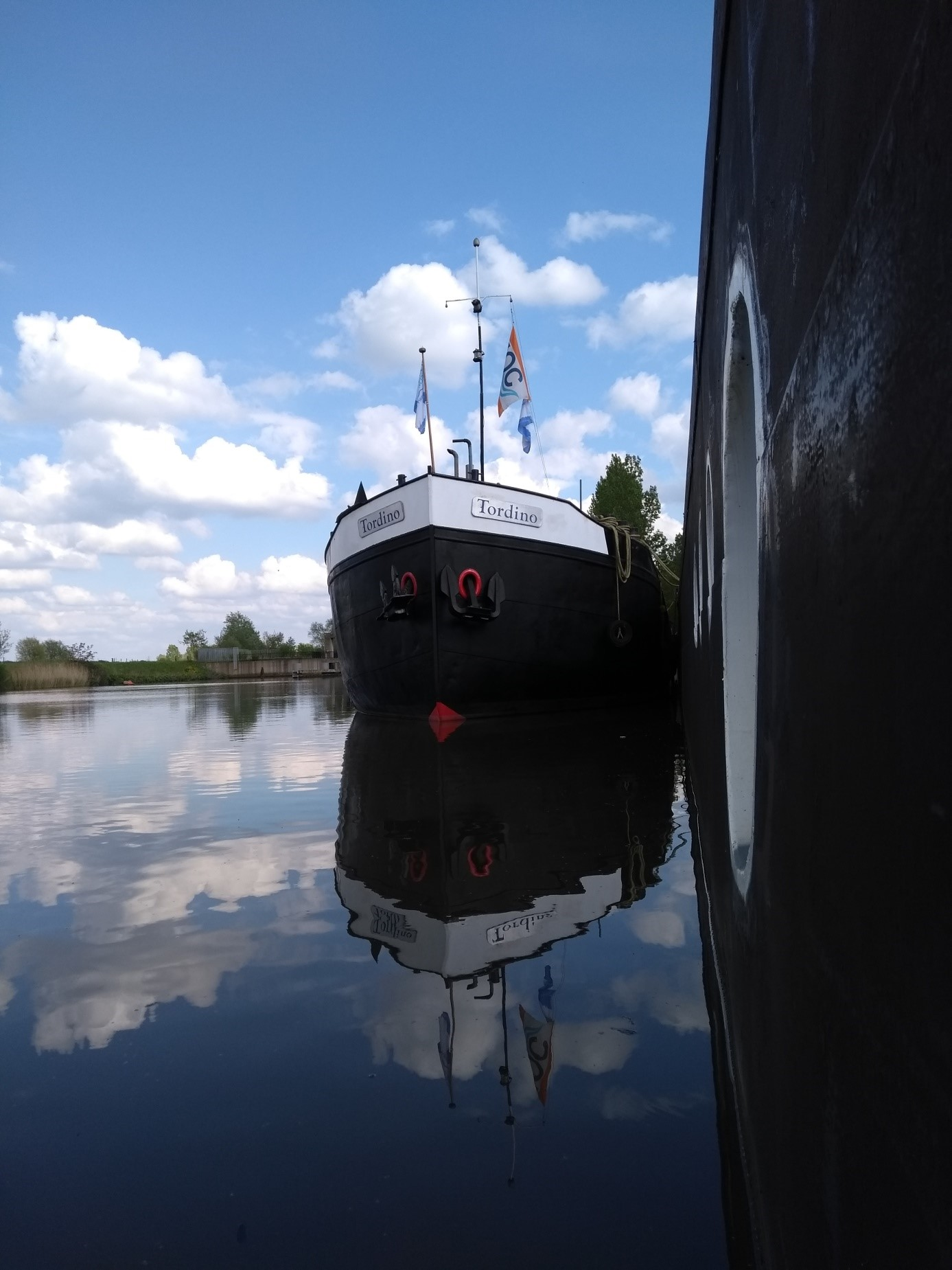 Kop van de Friese maatkast Tordino